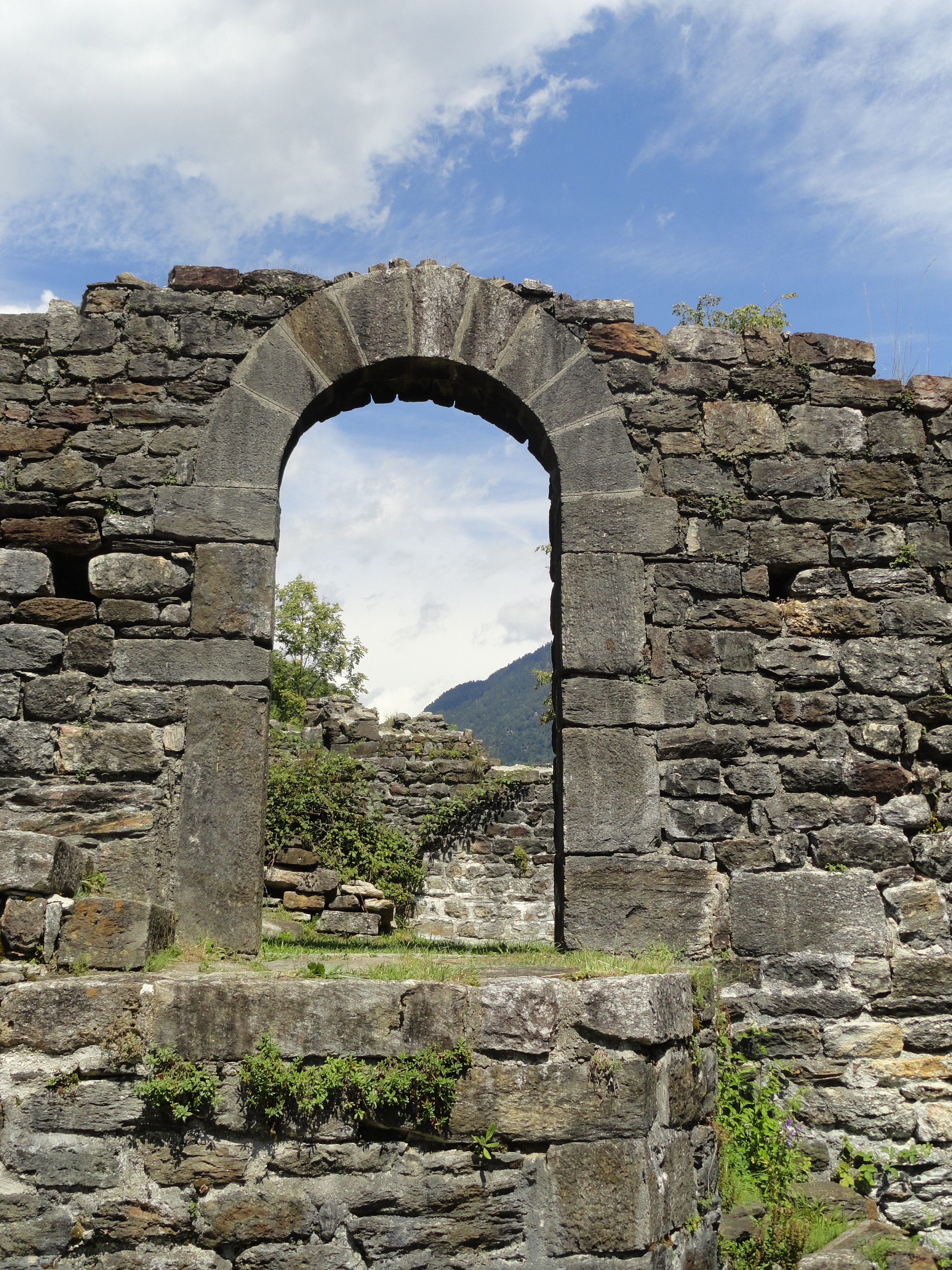 Serravalle